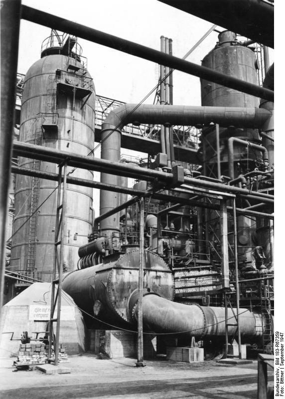 Mineralölwerk Lützkendorf, Raffinerie Illus-Bittner Das größte Mineralölwerk der sowjetischen Besatzungszone, 11.9.47 U.B.z.: Das Schmieröl- und Treibstoffwerk in Lützkendorf. Eine der großen Anlagen zur Erzeugung von Generatorgas aus Braunkohle. 837-47